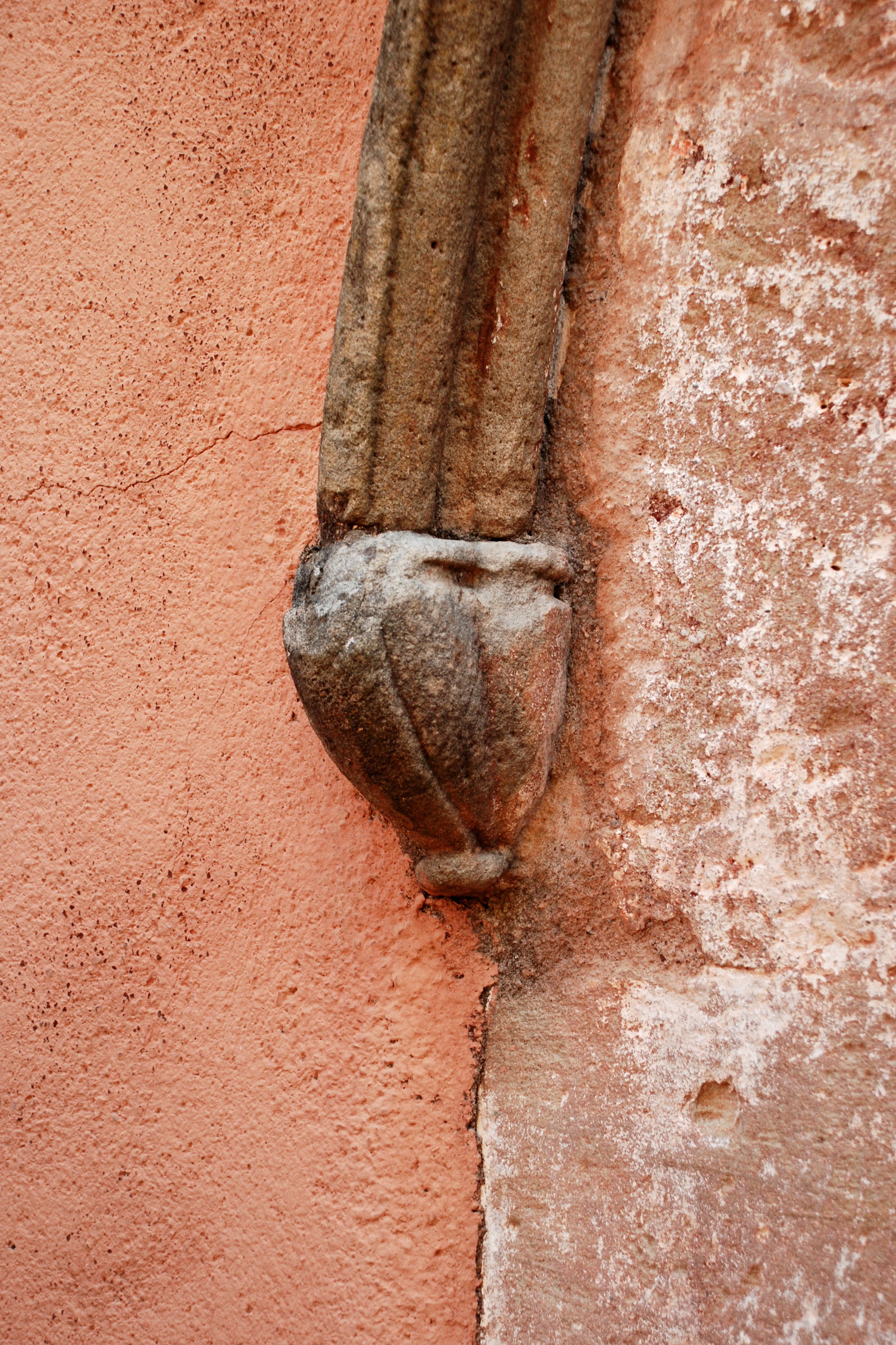 France - Languedoc - Hérault - La Tour-sur-Orb - Église Saint-Cyr et Sainte-Julite de Saint-Xist .